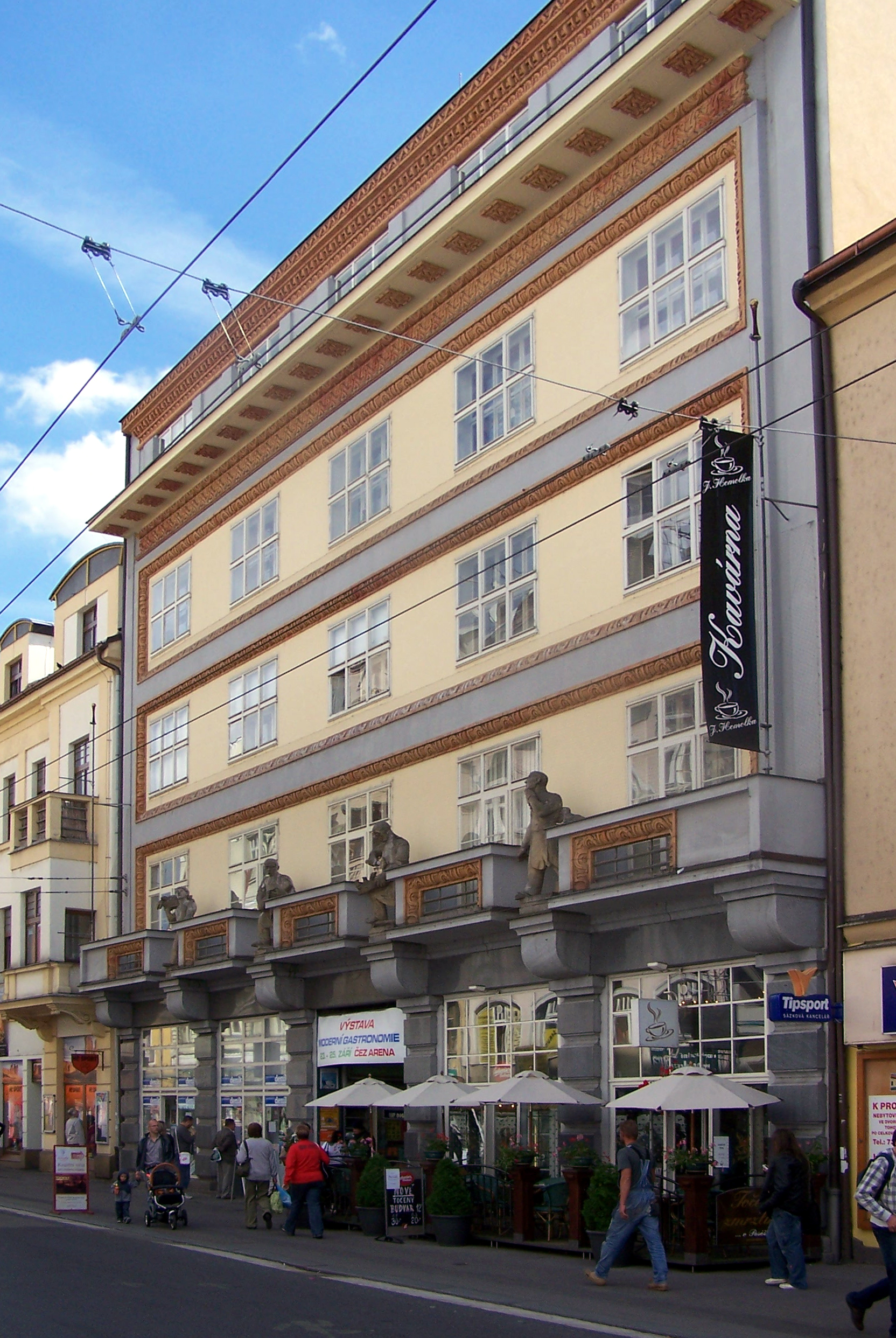 Průčelí budovy pasáže z Třídy Míru.